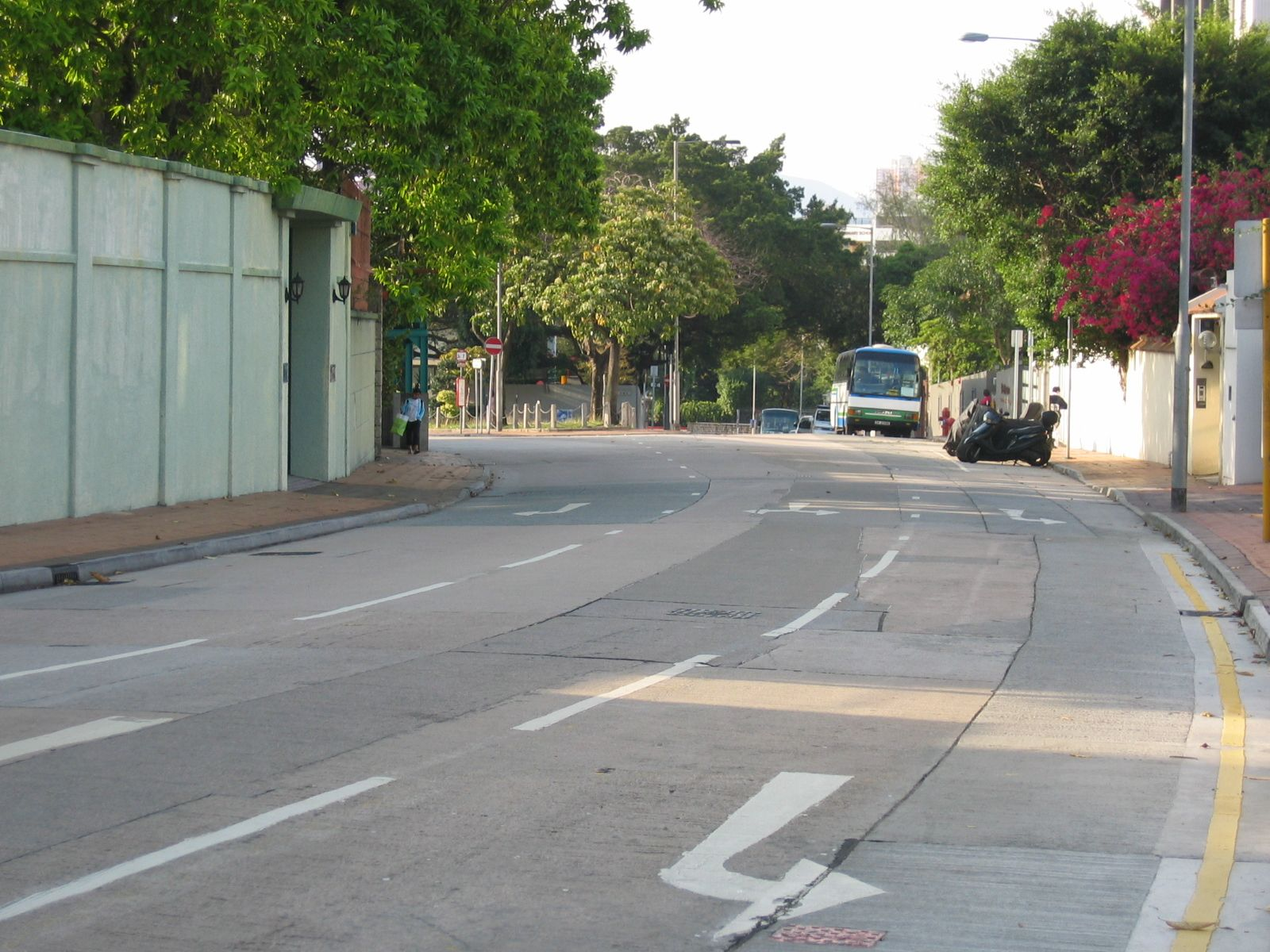 多實街孤形道及德雲道